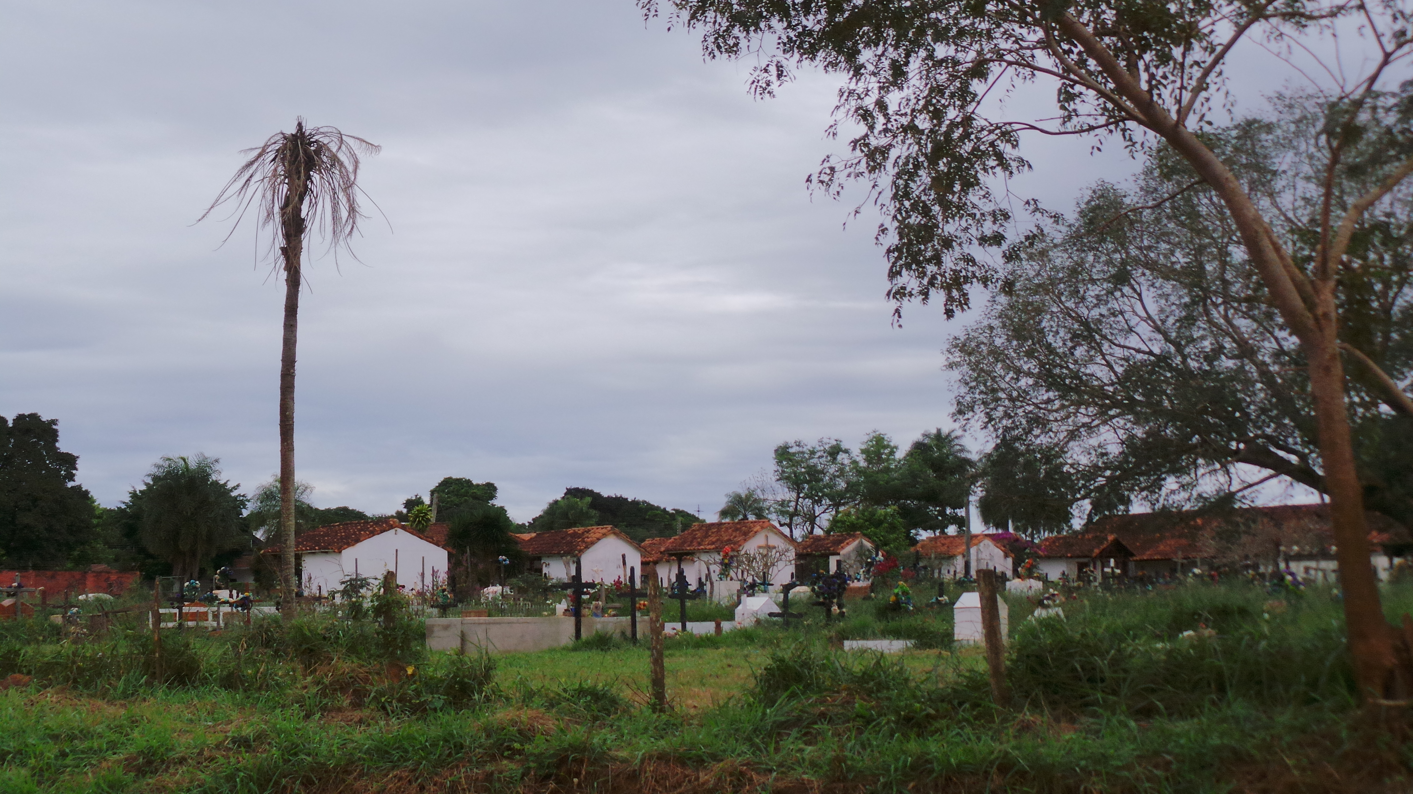 Municipio de Concepción, Bolivia en La Gran Chiquitanía